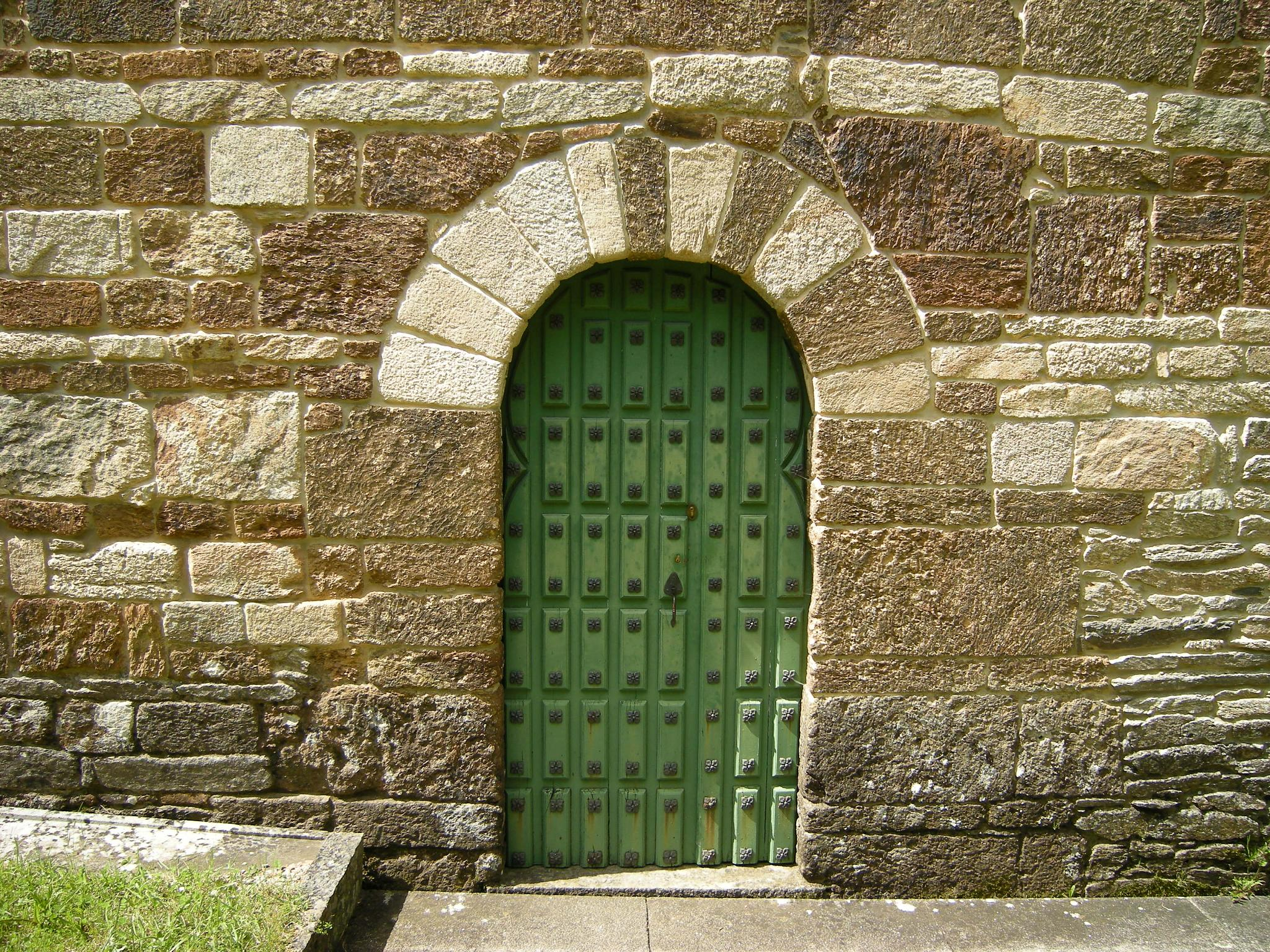 gl: Igrexa prerrománica de Santo Antolín de Toques